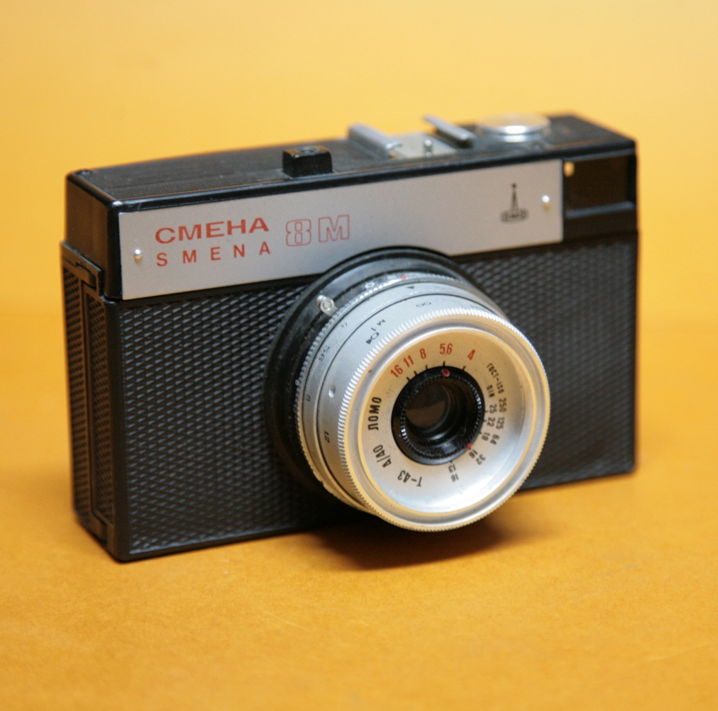 Coll. Marcè CL - LOMO Smena 8M 1970-1995